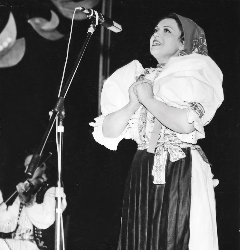 Anna Hulejová pri vystúpení.